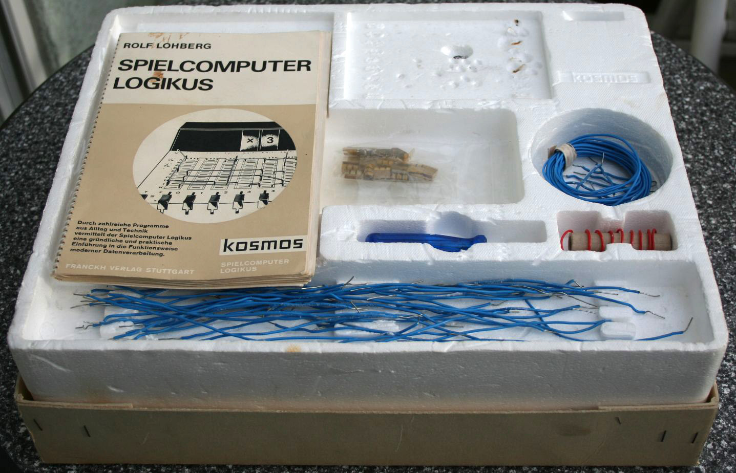 Logikus, aus dem eigenen Bestand für die Wikipedia fotografiert.